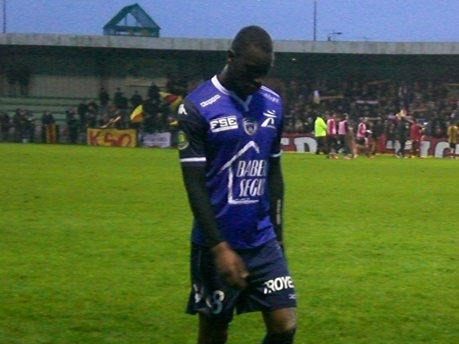 Randi Goteni lors du match RC Lens B / ES Troyes B, comptant pour la dix-huitième journée du Championnat de France de football amateur (CFA), le13 février 2016, au Stade François Blin d'Avion.